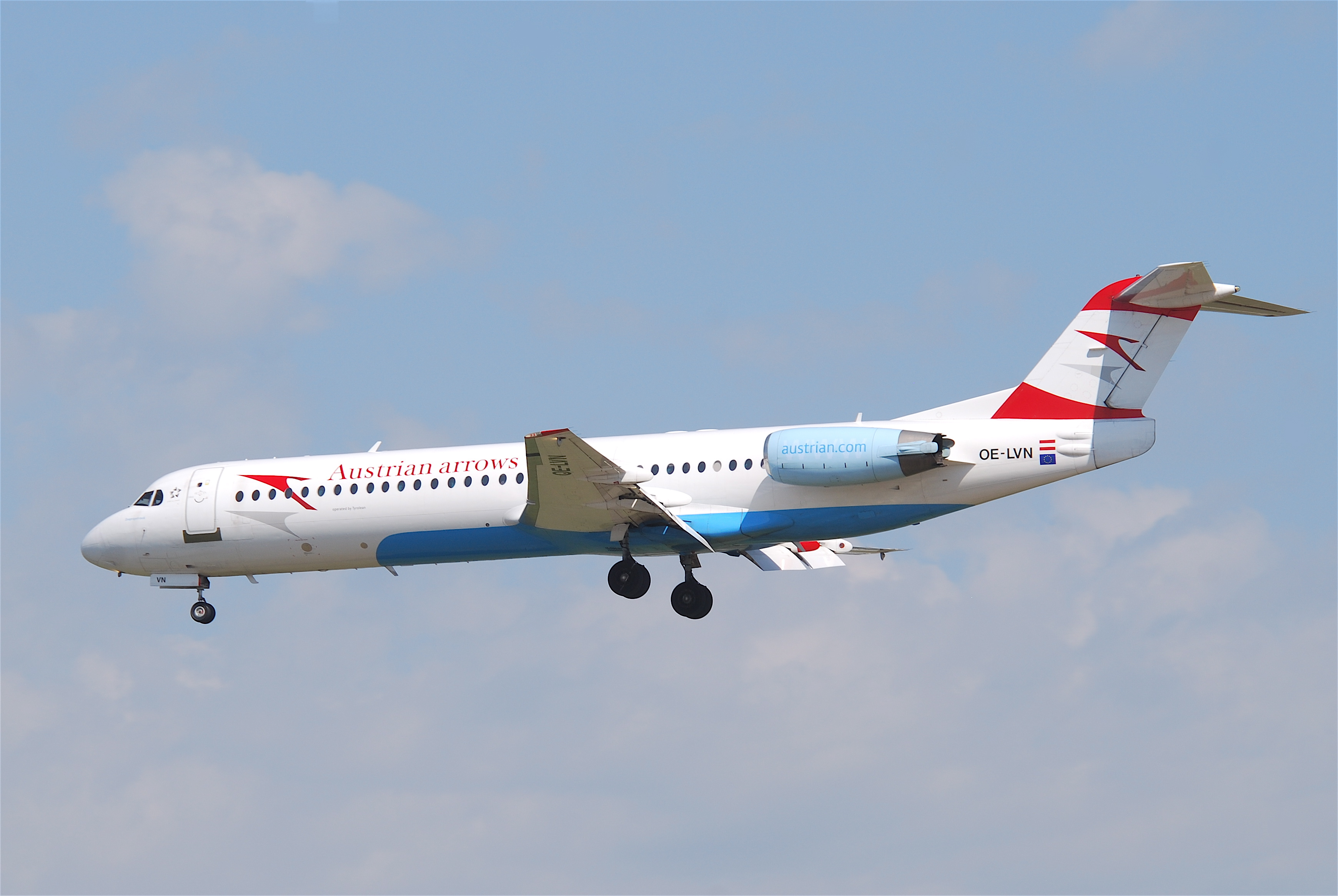 Austrian Airlines Fokker 100; OE-LVN@FRA;06.07.2011/603go